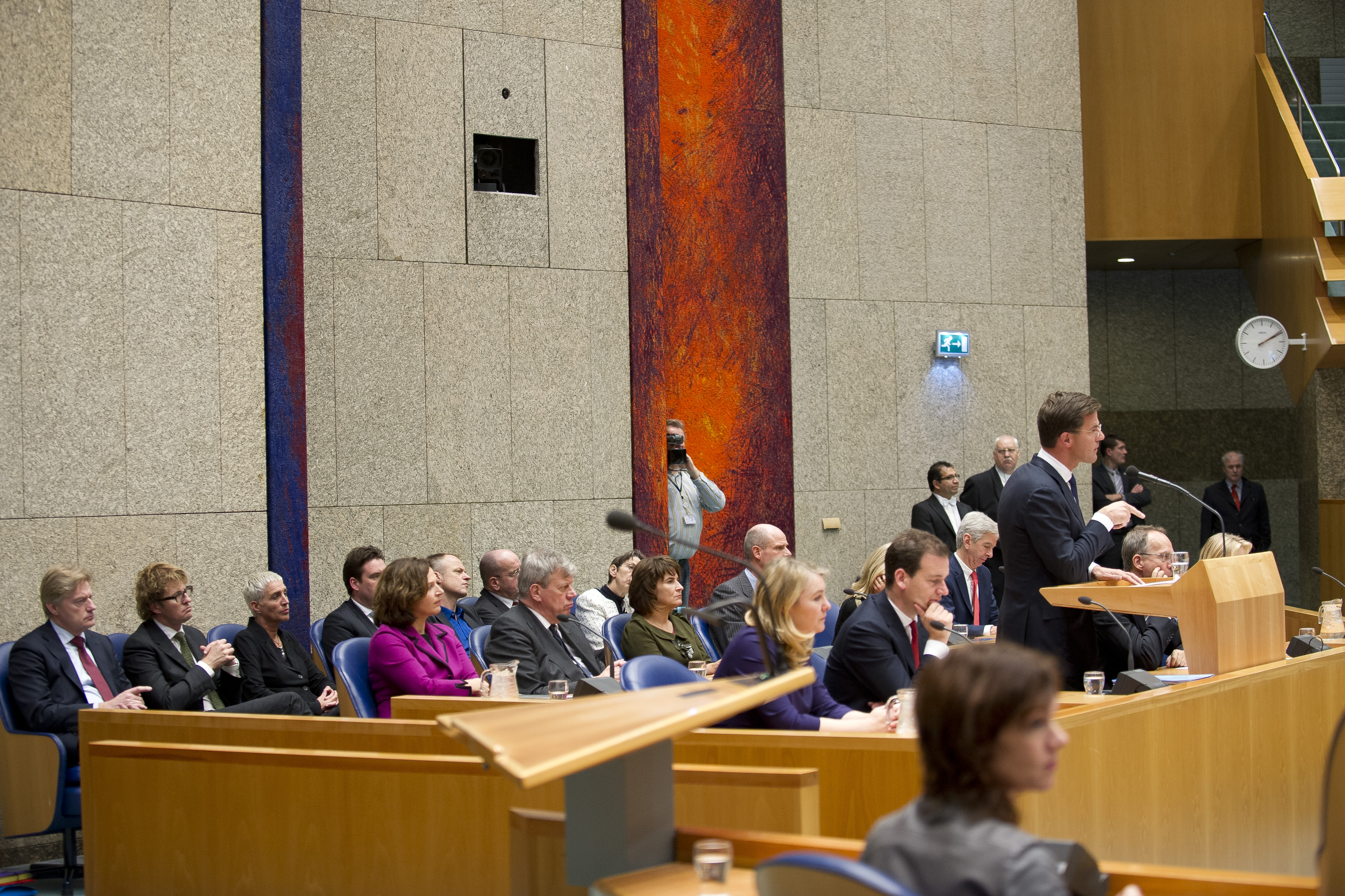 Het Nederlandse kabinet-Rutte II (ministers en staatssecretarissen) bijeen voor het debat over de regeringsverklaring in Vak K (november 2012)